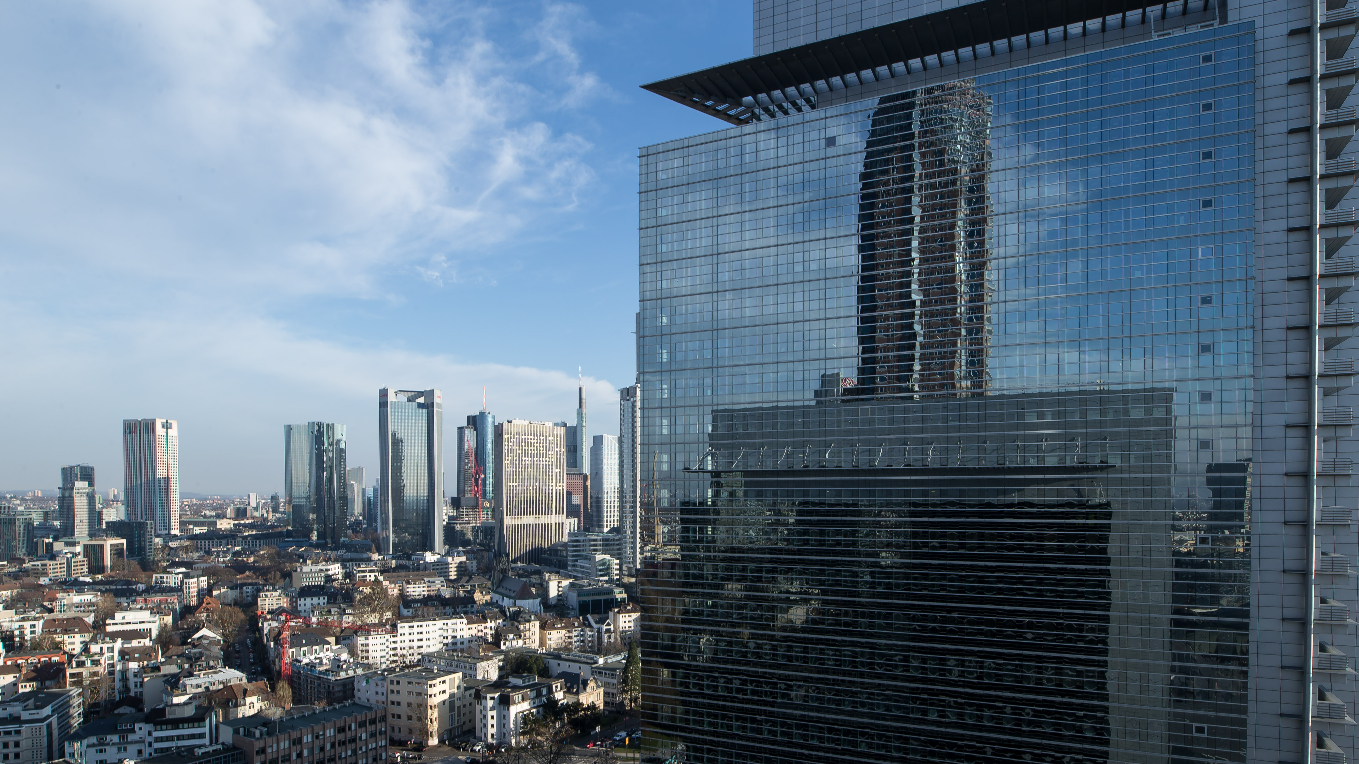 Firmenzentrale